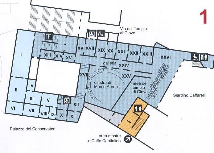 Roma, Musei capitolini al Palazzo dei Conservatori: pianta del piano nobile